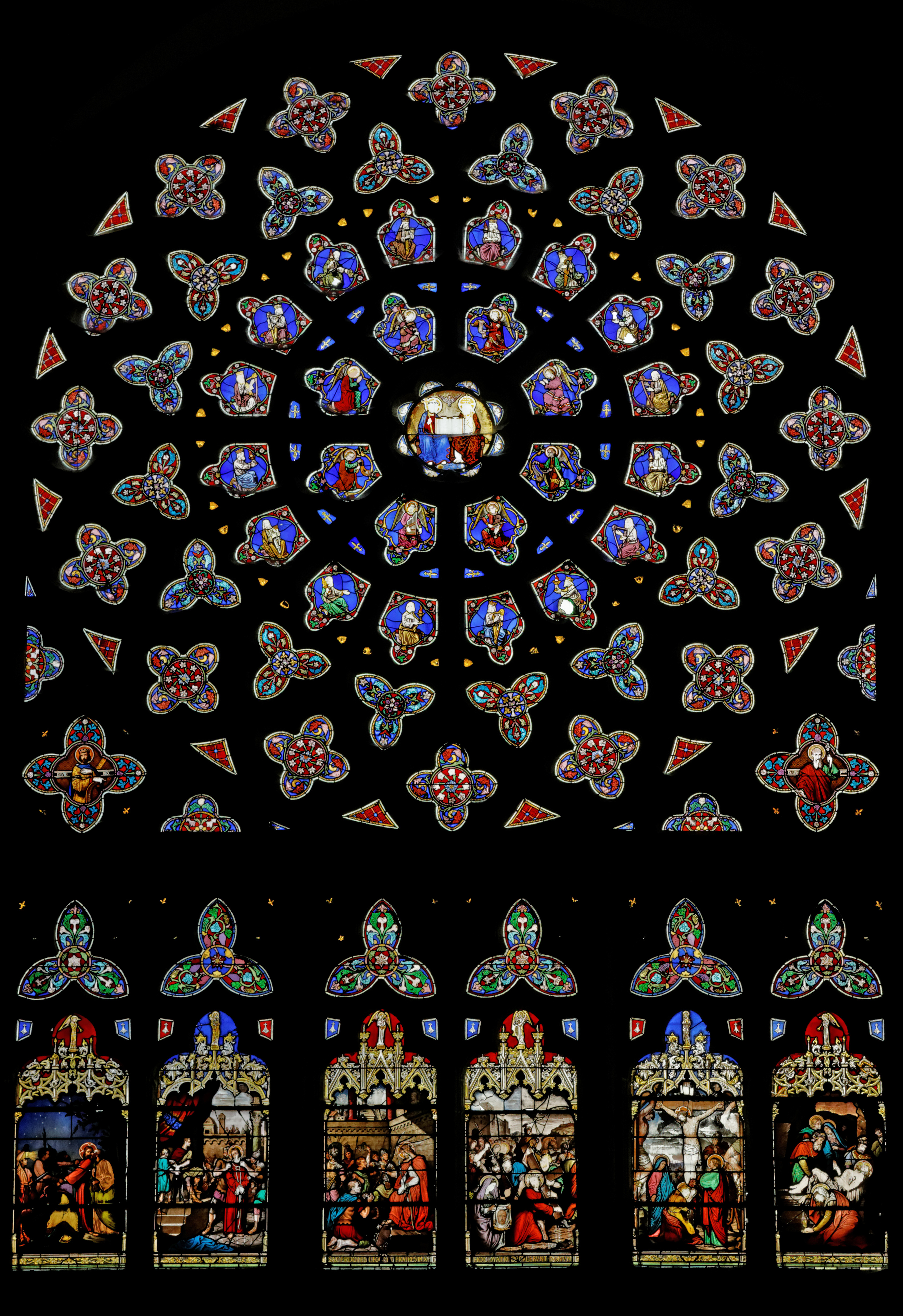 Vitrail de Lobin (Tours) daté de 1873 dans la cathédrale Saint-Paul-Aurélien de Saint-Pol-de-Léon. Plusieurs scènes sont représentées : l'Arrestation de Jésus, Jésus devant Pilate, la Dérision, Véronique, la Crucifixion, la Déposition de la Croix. Dans le cœur de la rose se trouve représentée la Trinité. La première couronne de la rose est occupée par des anges musiciens, orants et thuriféraires. La deuxième couronne comporte des rois jouant de la harpe ou portant des flambeaux. Les troisième et quatrième couronnes comportent des trilobes et des quadrilobes garnies de feuillages.